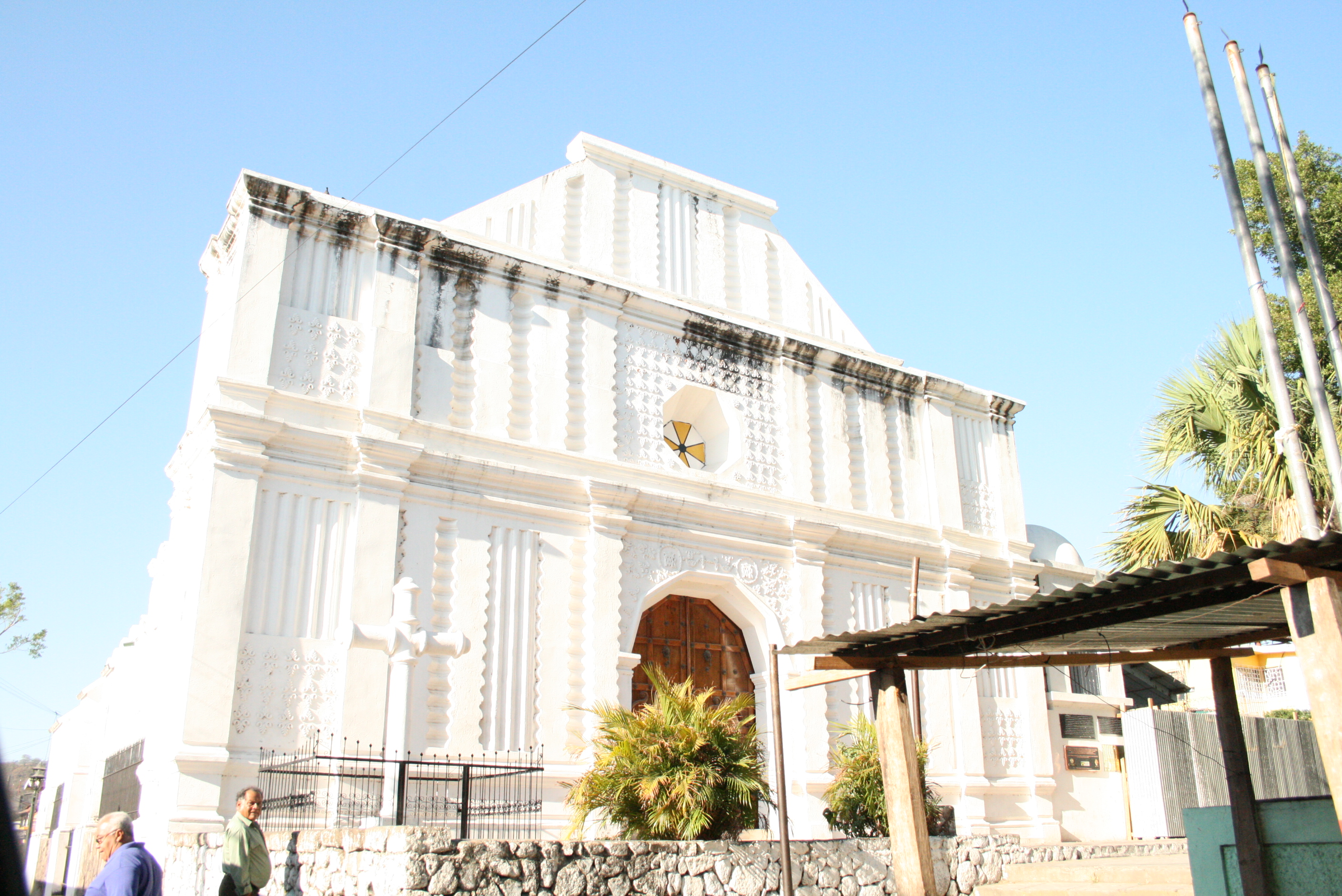 Iglesia emblemática, con mucha historia.